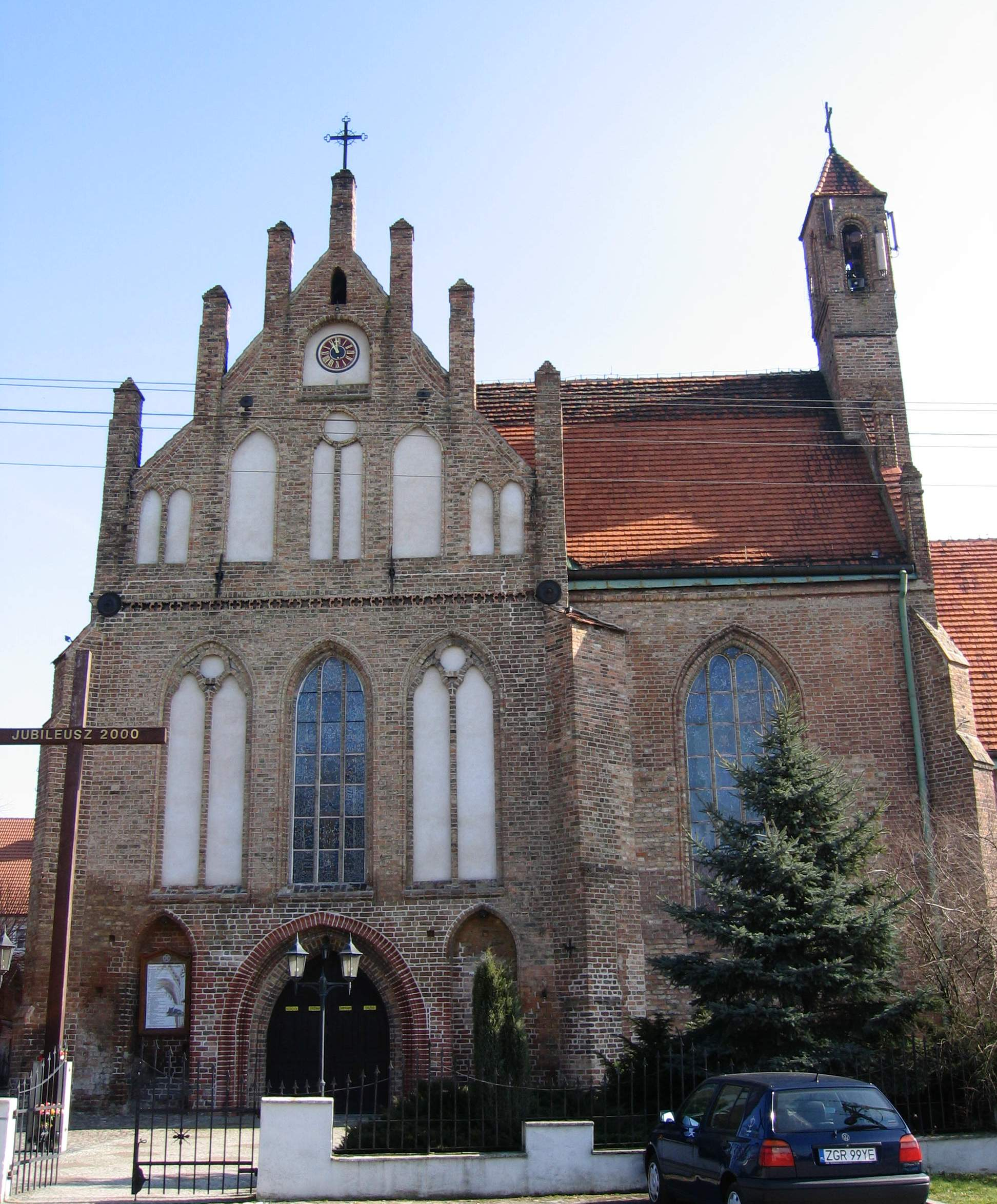 Chojna - kościół p.w. Św. Trójcy